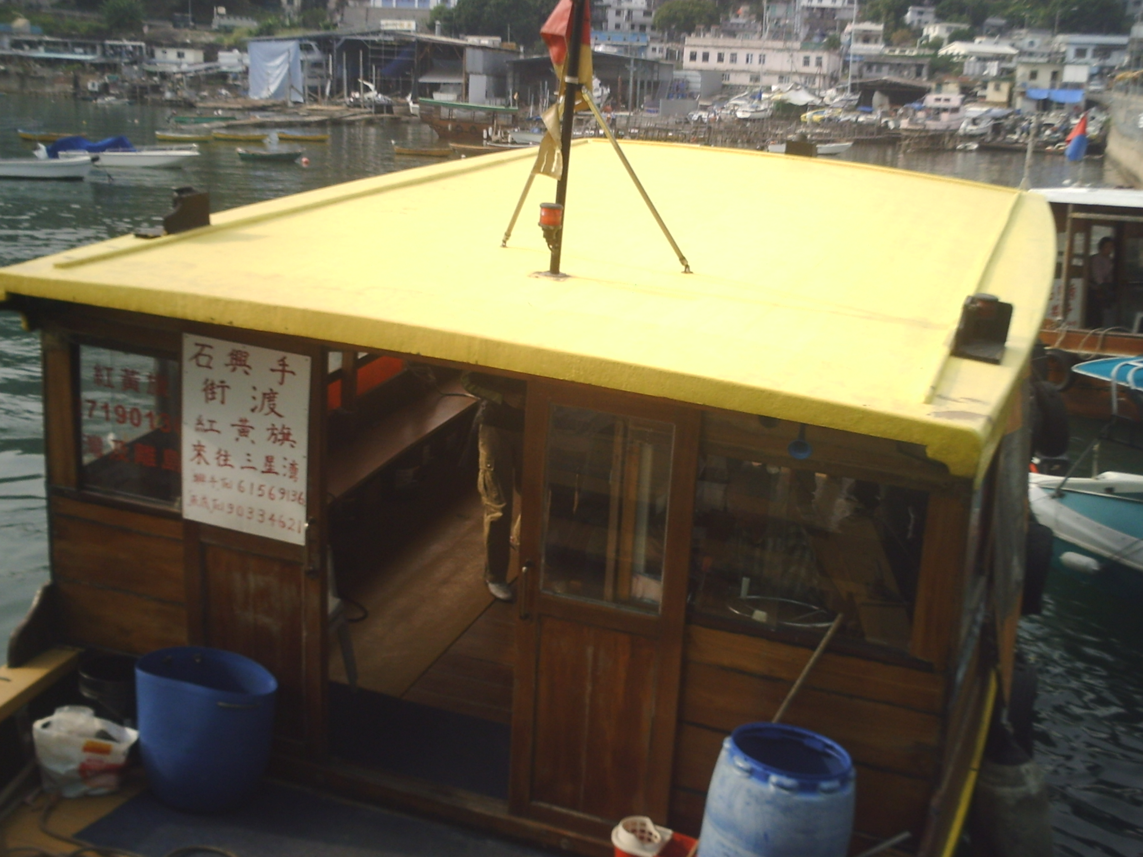 中文（香港）: 西貢白沙灣住三星灣的街渡